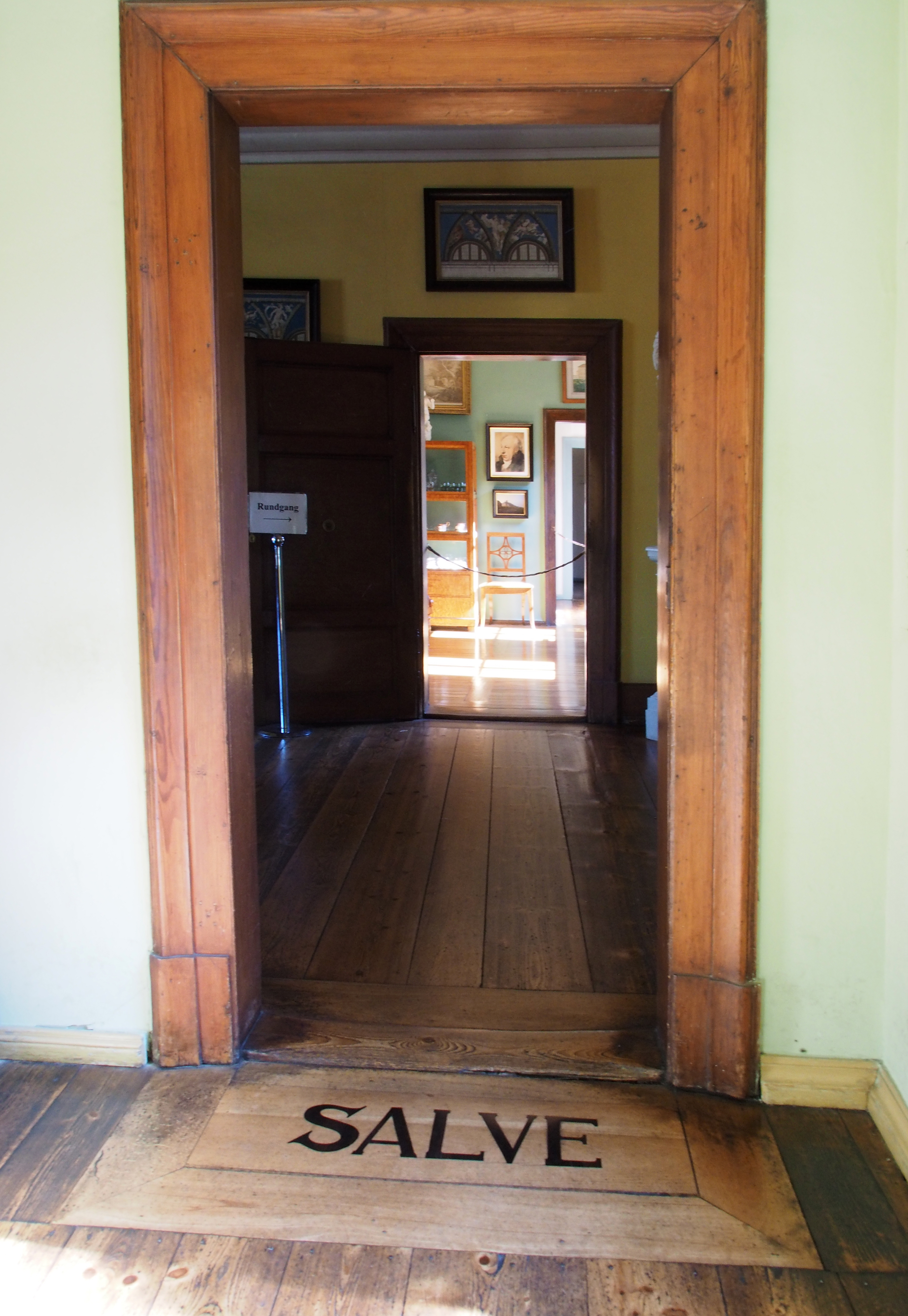 Eintritt in den Wohnbereich in Goethes ehemaligem Wohnhaus in Weimar